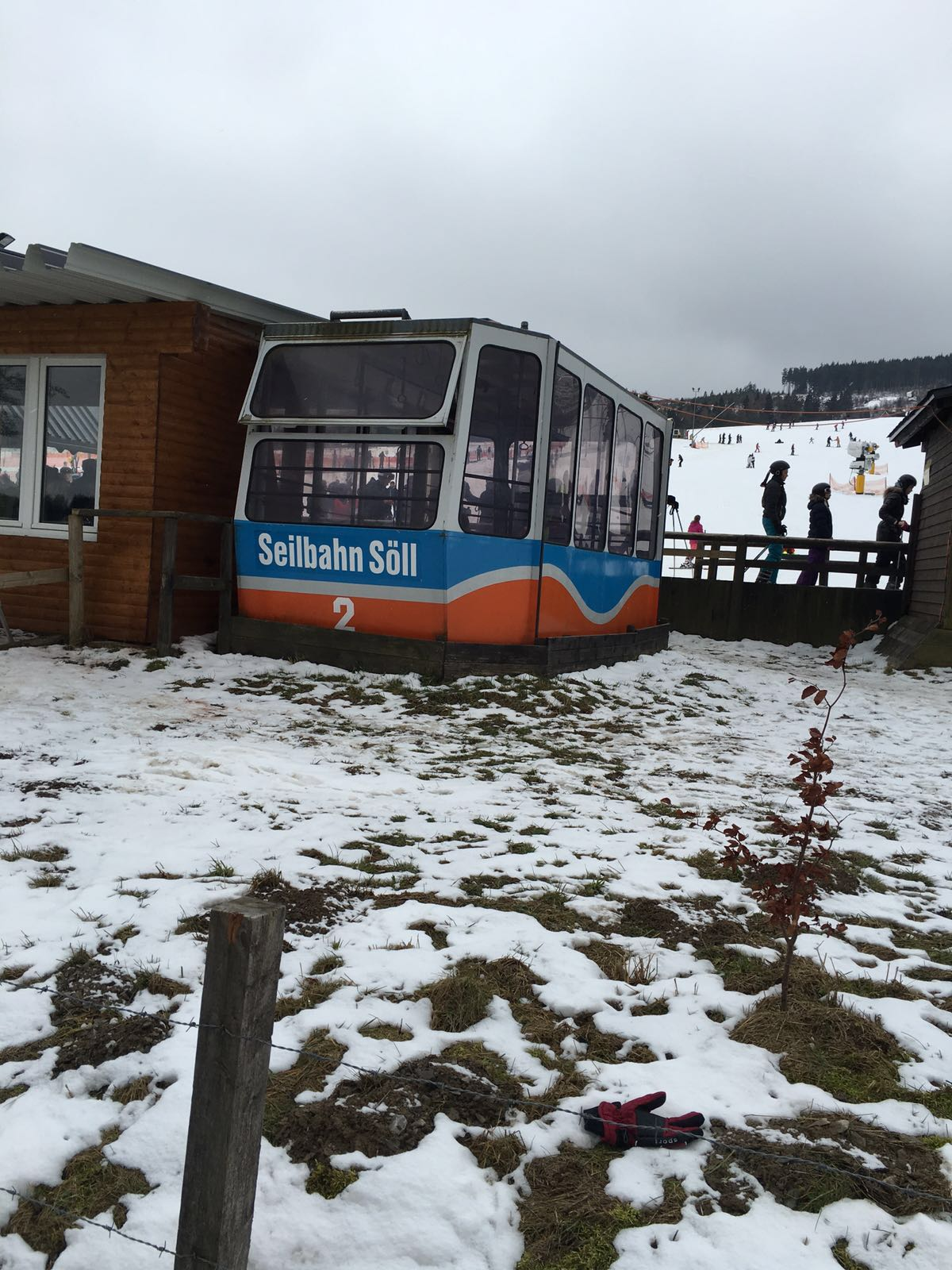 Hier te zien naast het barretje.